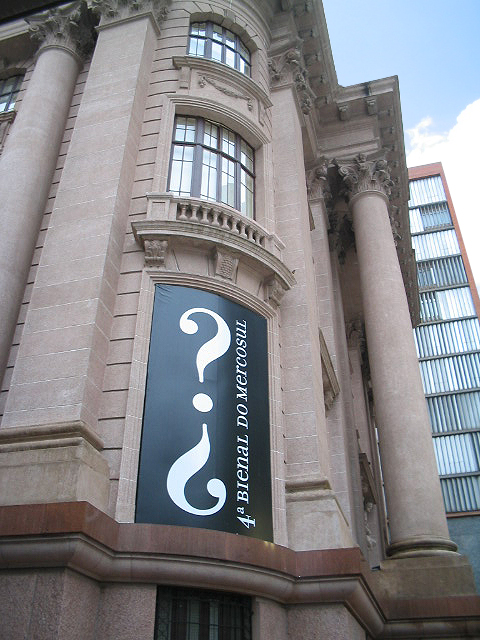 Bienal do Mercosul, 2003